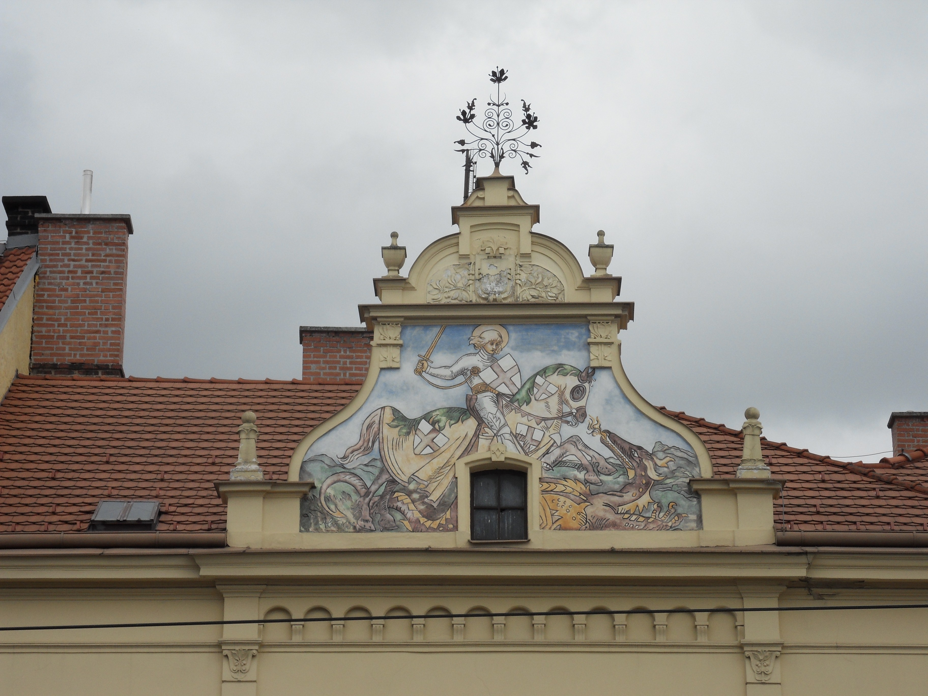 Štechova vila, Plzeň 3-Jižní Předměstí, Klatovská třída 1202/123, Dvořákova 1202/1, Plzeň.